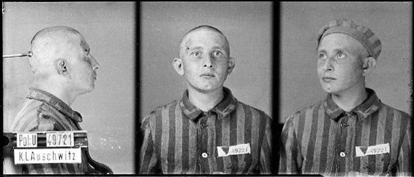 Василь Бандера в концтаборі Аушвіц